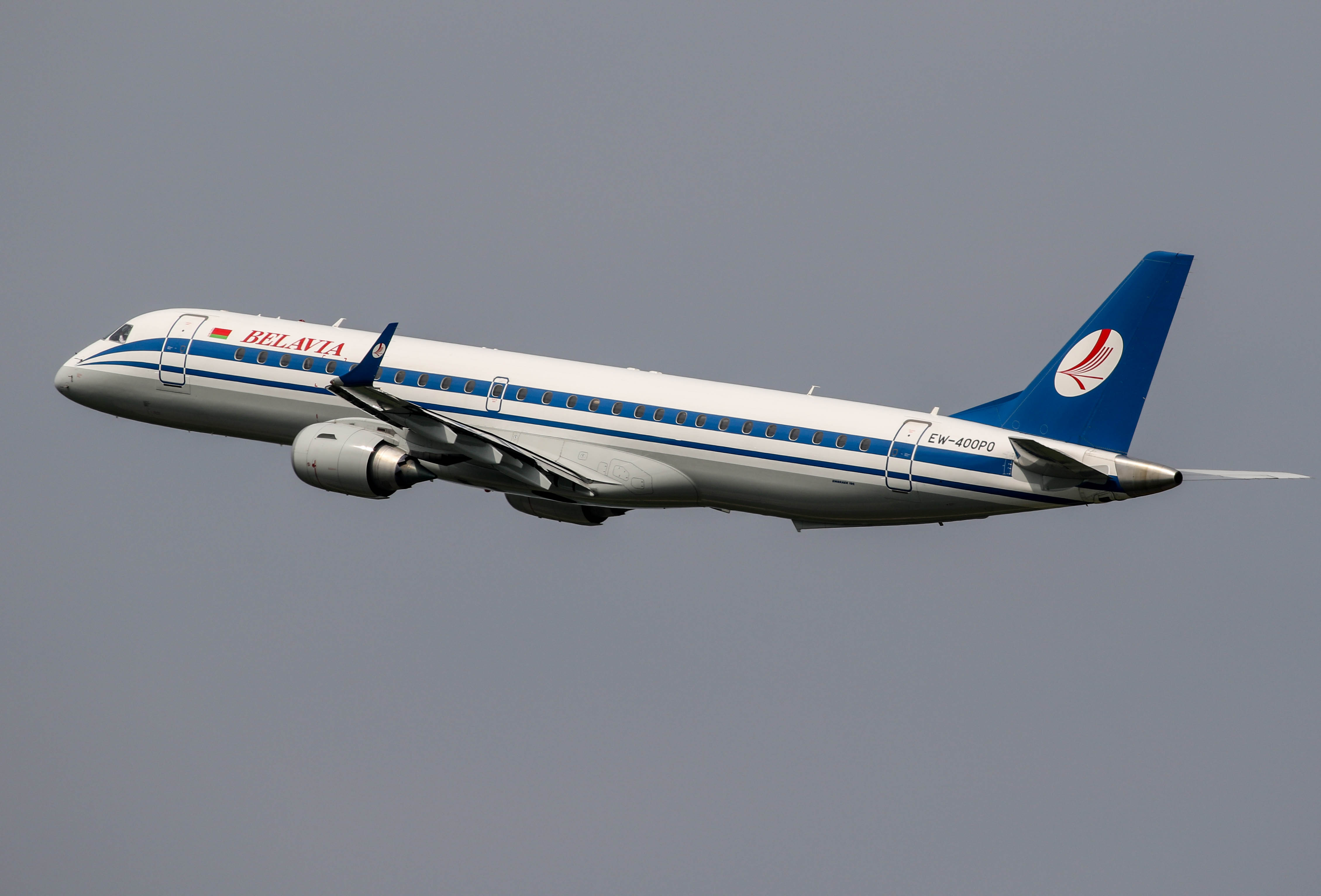 Belavia EW-400PO